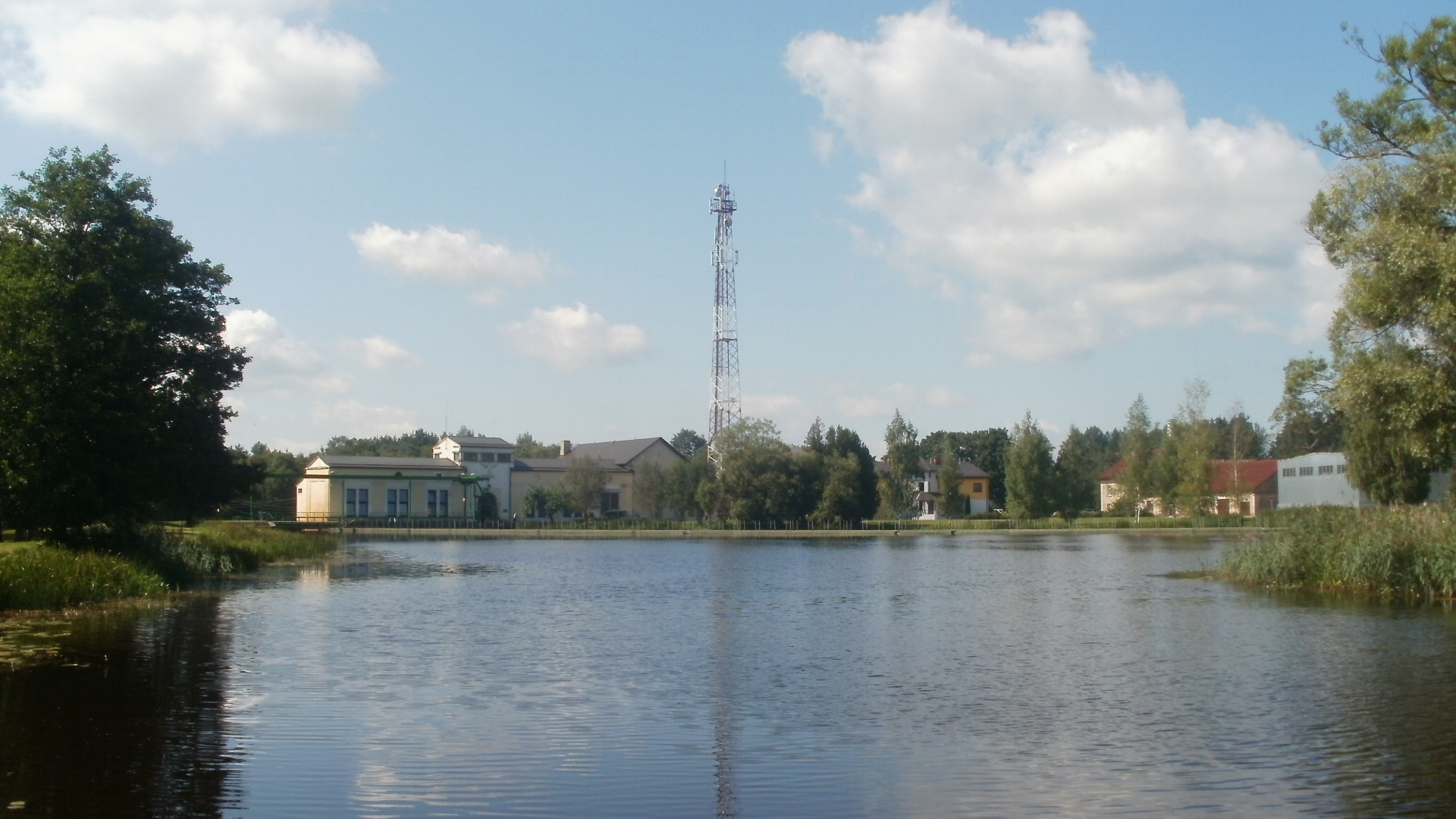 Spēkstacija